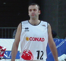 Román González in lunetta per un tiro libero, dietro di lui il croato Damir Tvrdić, nel corso del match Basket Rimini Crabs vs. Aironi Novara.